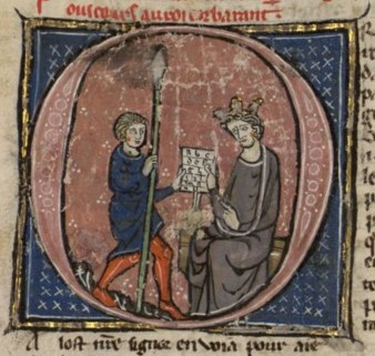 Balduin et le messager